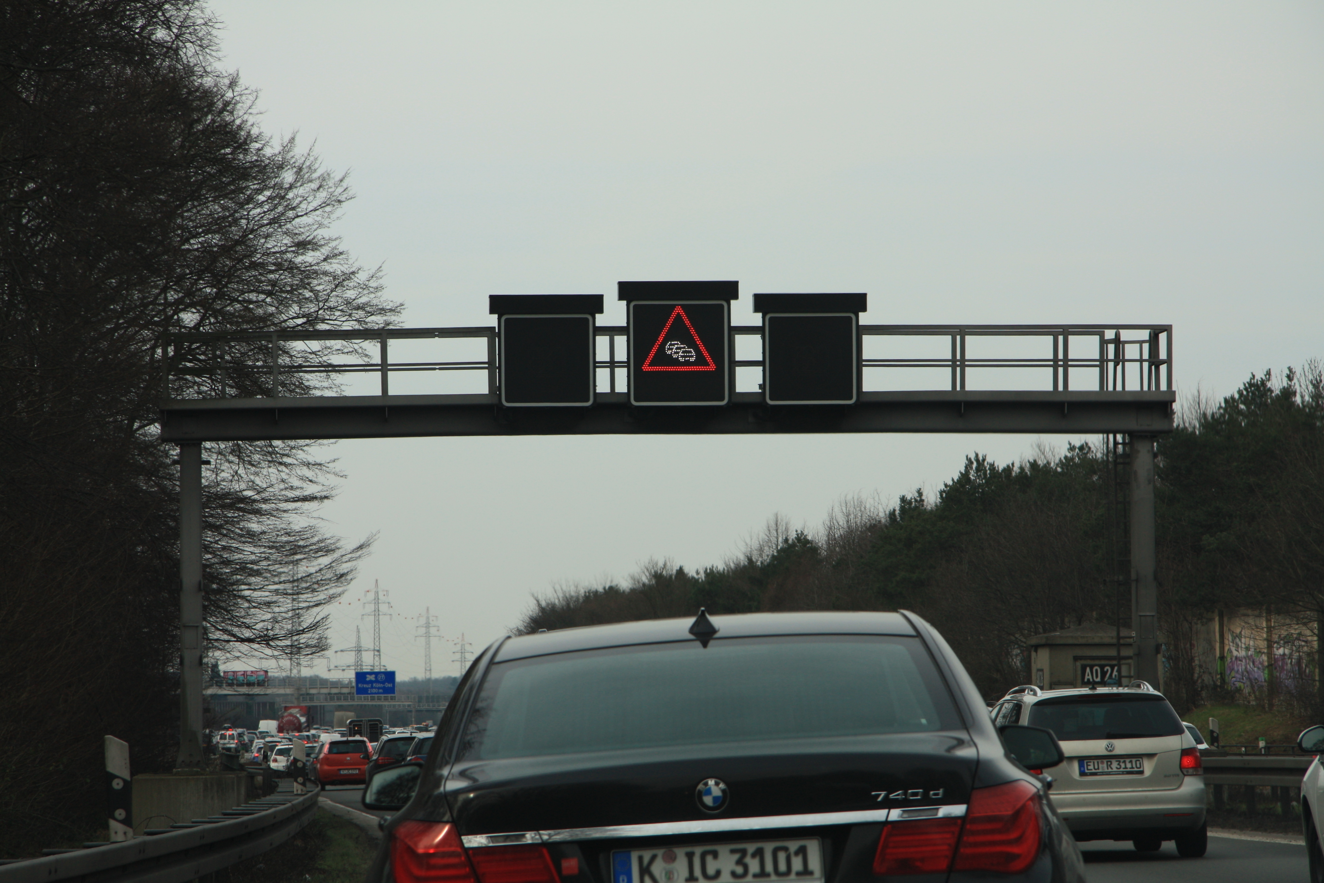 A4 (E 40) Dreieck Heumar - Wechselverkehrszeichen